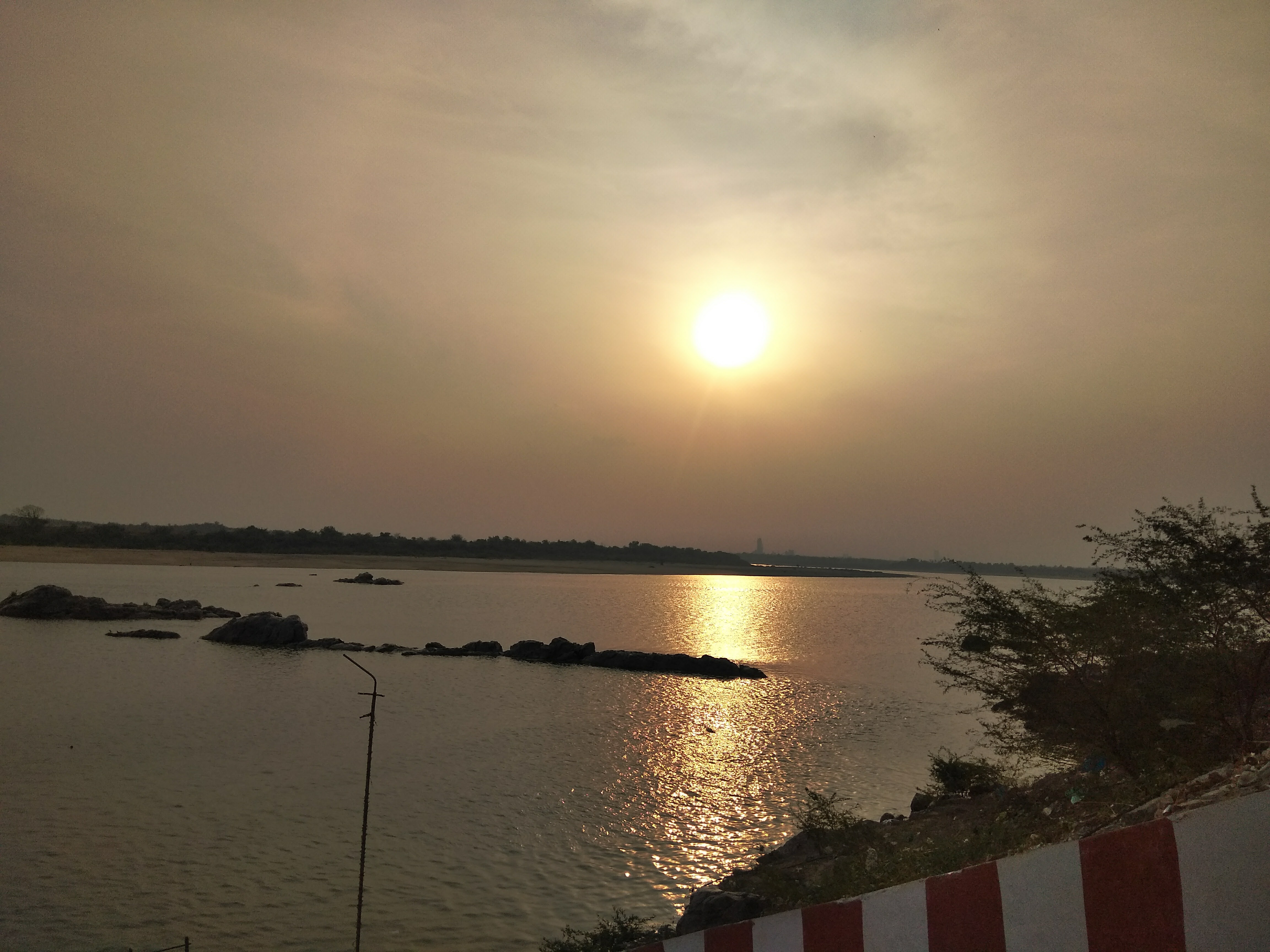 కృష్ణాతీర వేదాద్రి దగ్గర సూర్యాస్తమయ దృశ్యం